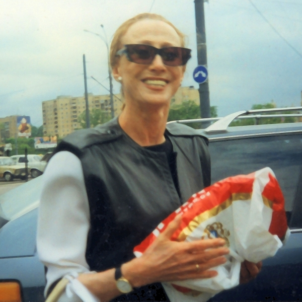 Майя Плисецкая. Площадь Киевского вокзала, Москва, 23 июля 2000 года